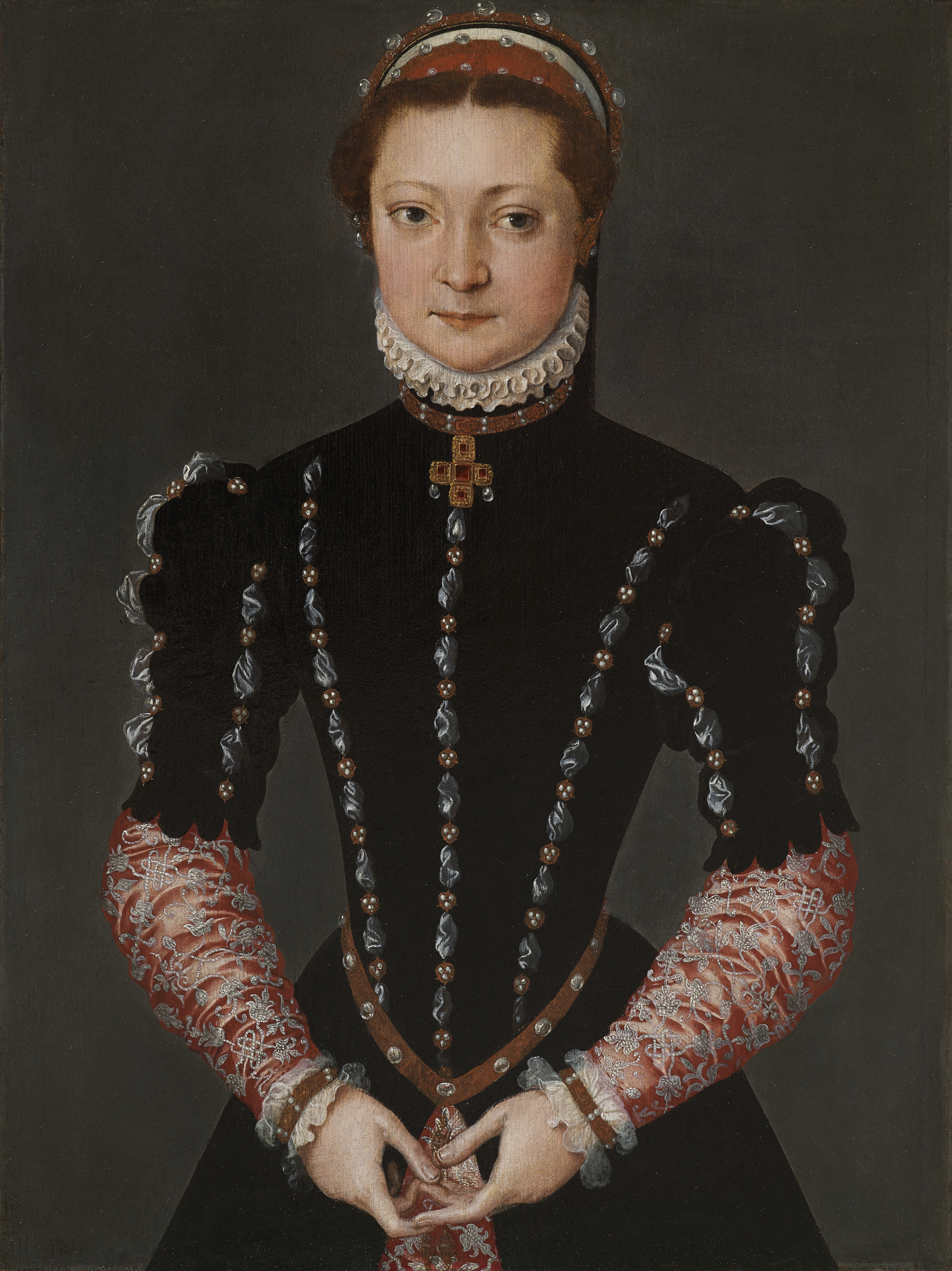 Portrait of a noble young lady